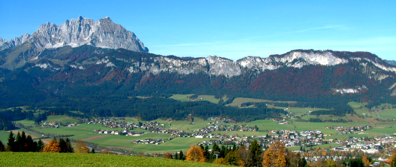 St. Johann in Tirol